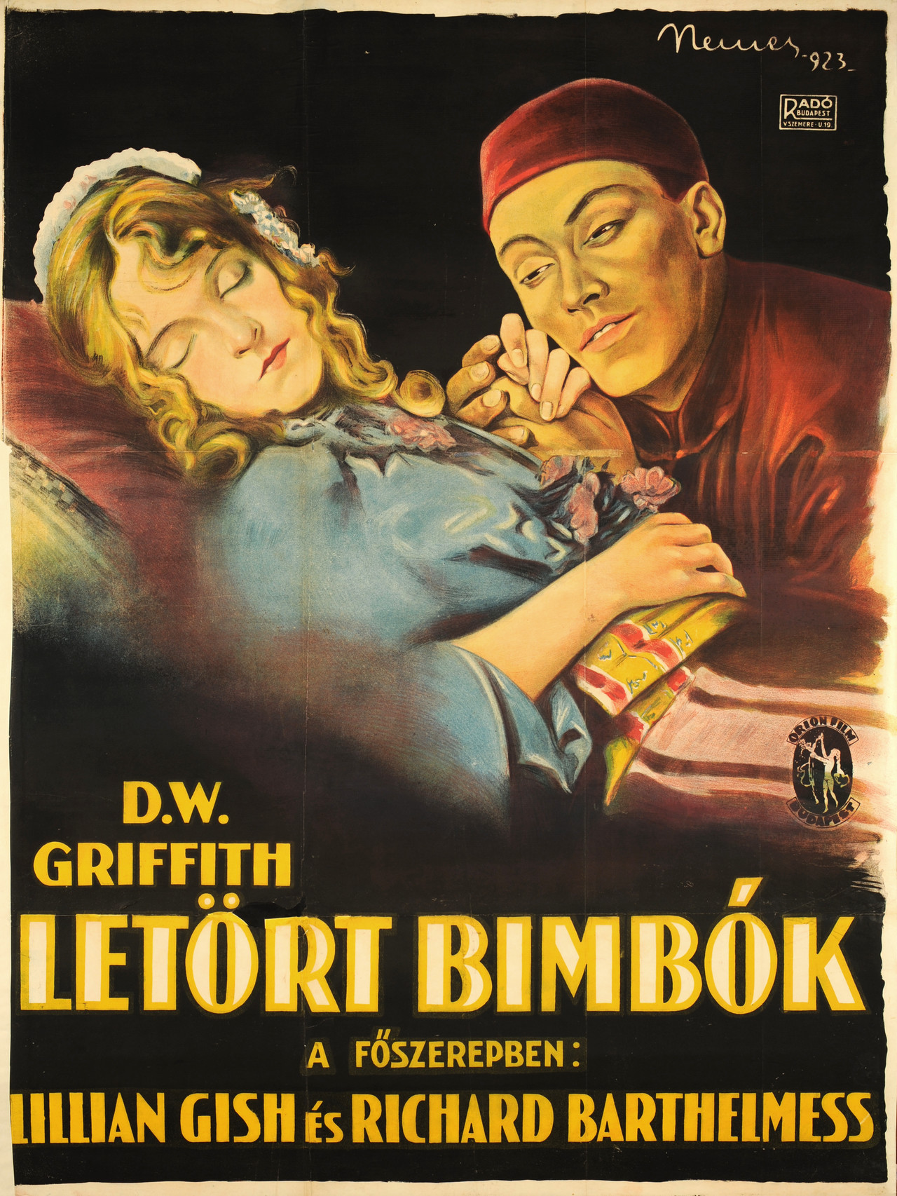 A Letört bimbók című 1919-es amerikai némafilm magyarországi plakátja